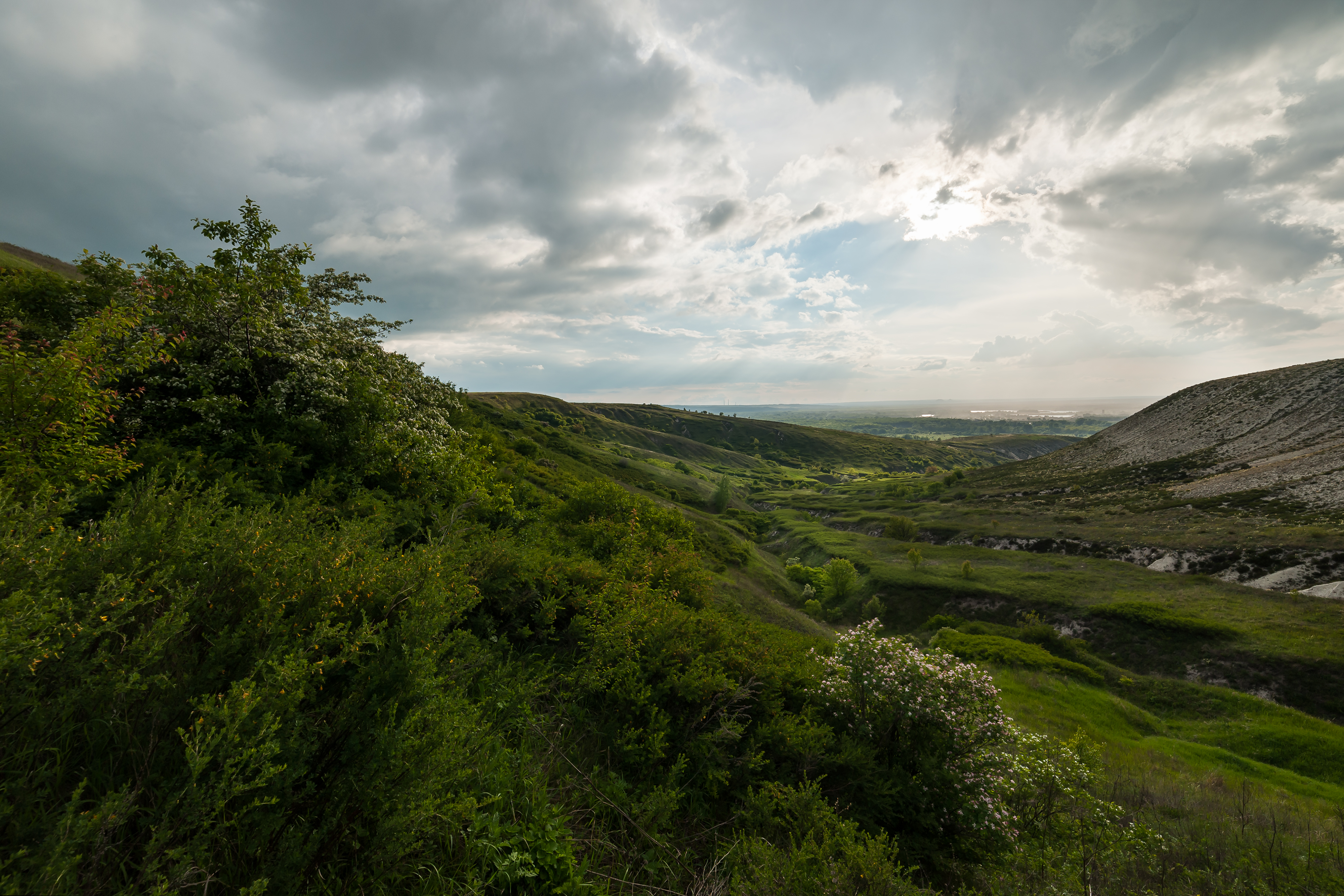 Крейдяна флора, Слов'янський р-н, біля с. Піскунівка, Краснолиманський р-н, біля с. Закітне та с. Крива Лука Слов'янський (634,0 га) та Краснолиманський р-ни (500,0 га)